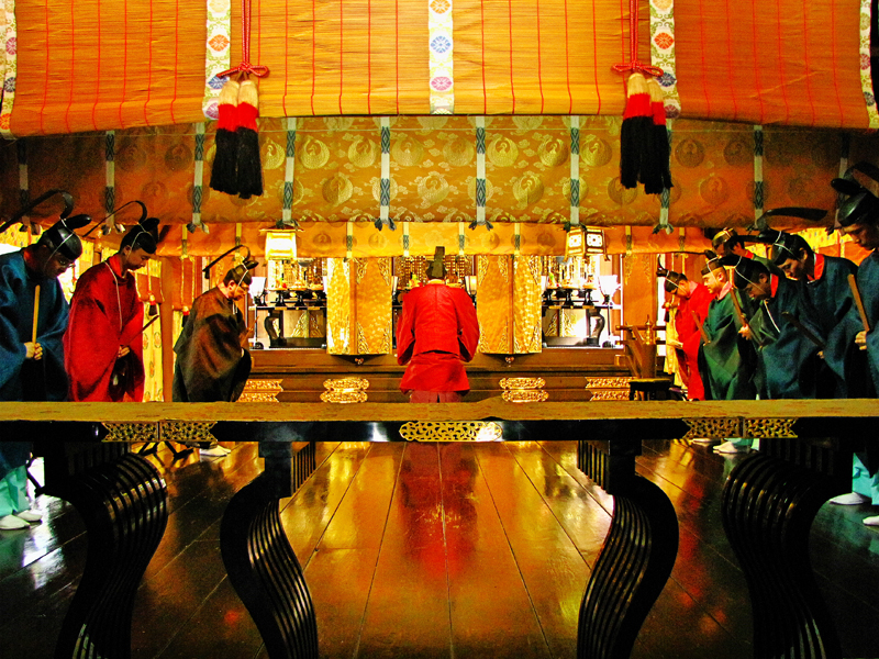 例大祭の様子